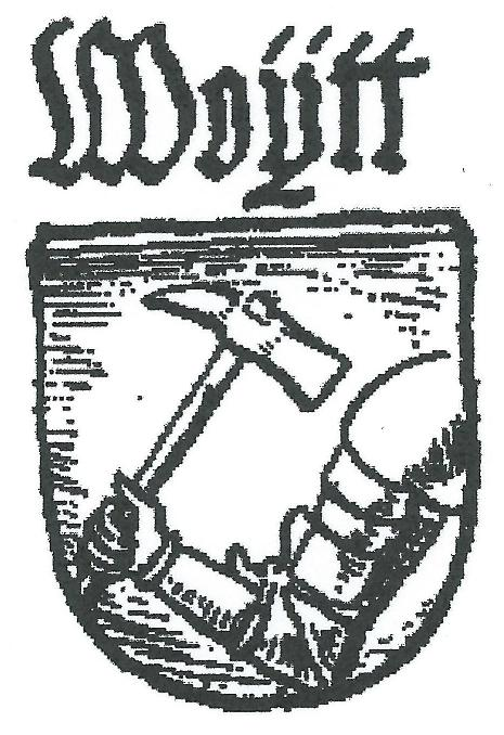 Woytt. Georg Christian W., *1694Erster Statdpfarre, Konsistorialrat und luth. Inspektor in Ottweiler. Kaiserlich gekrönter Poet und Mitglied des Edelgekrönten Pegnischen Blumenordens.